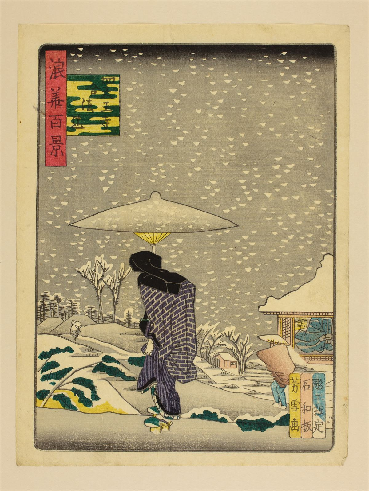 1800年代。南粋亭芳雪/画。浪花百景 102枚のうちの1枚。大阪市立中央図書館蔵。